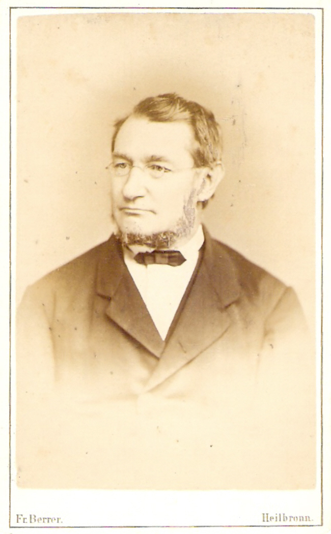 Julius Robert von Mayer